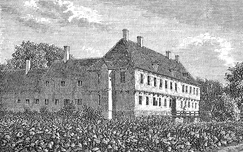 Holmegaard er en gammel gård, som nævnes før 1375. Gården ligger ca. 8 km nordøst for Næstved i Holme Olstrup Sogn